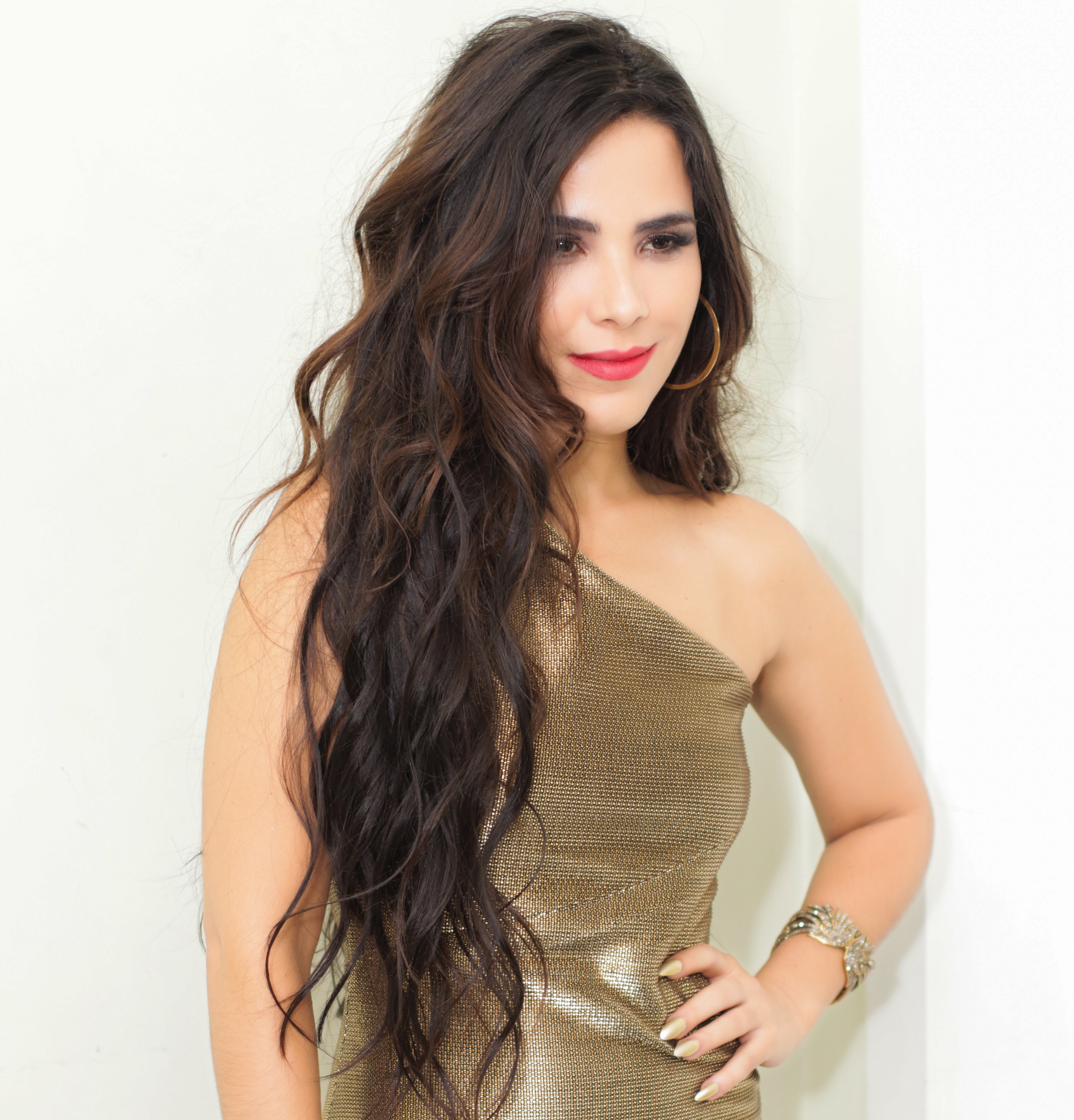 Wanessa Camargo na festa de lançamento de Bumbum No Ar com Lia Clark